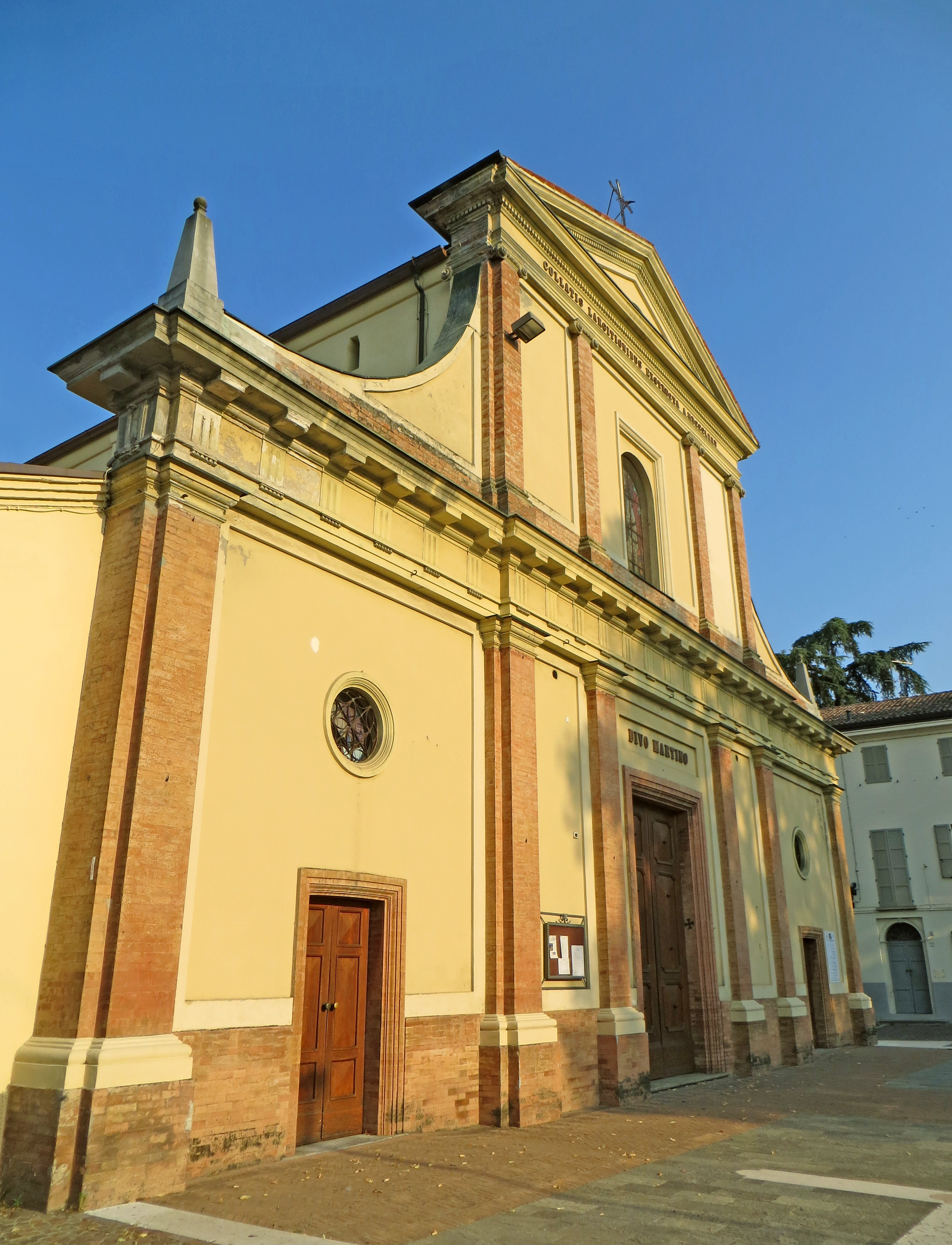 Chiesa di San Martino (Noceto) - facciata